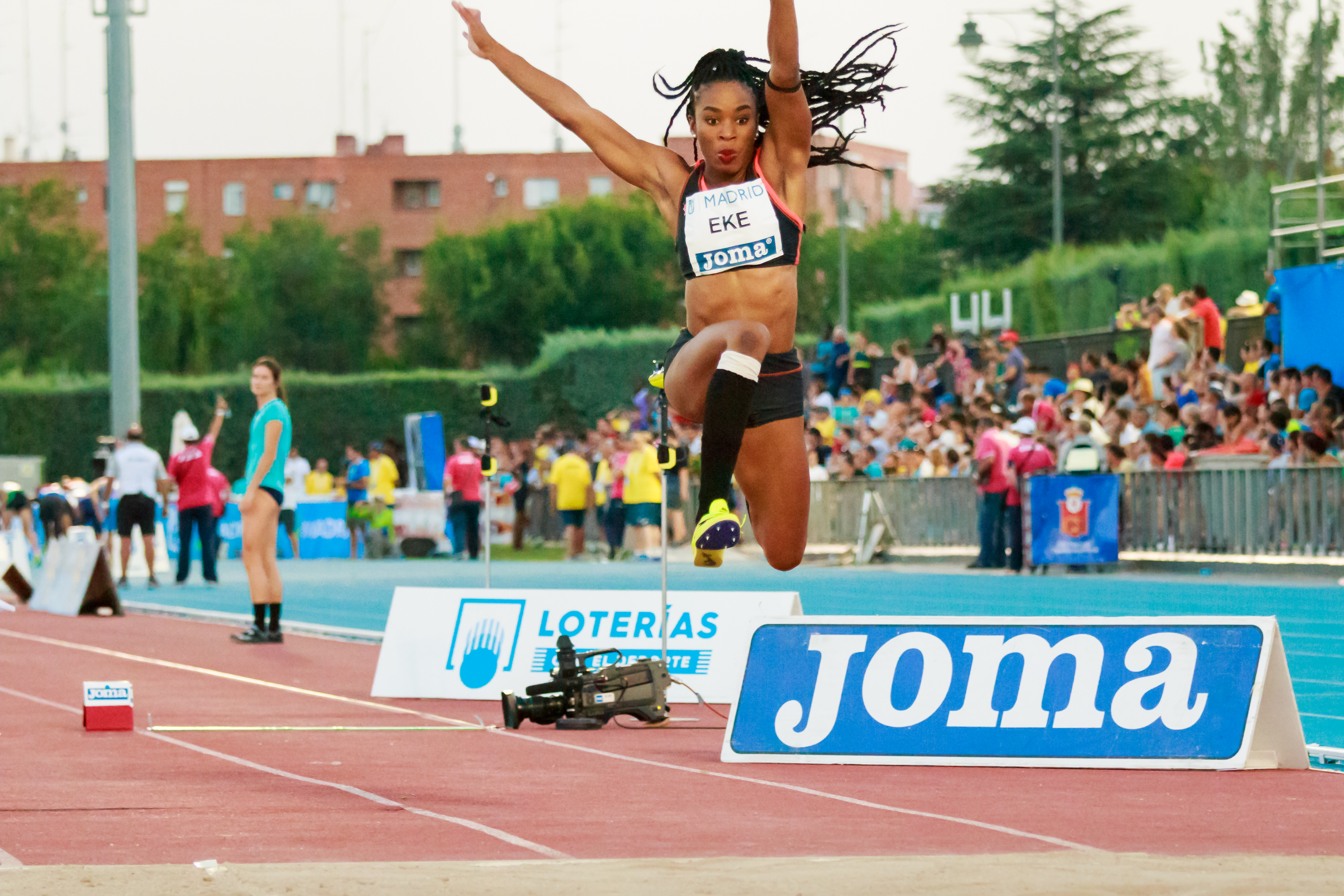 Nadia Eke (GHA). Triple salto. IAAF World Challenge. Meeting Madrid 2017. Moratalaz, Madrid.